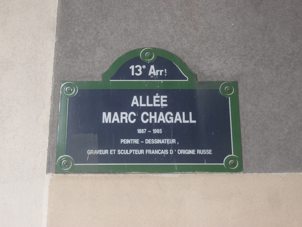 Paris 13e arrondissement, allée Marc-Chagall, plaque